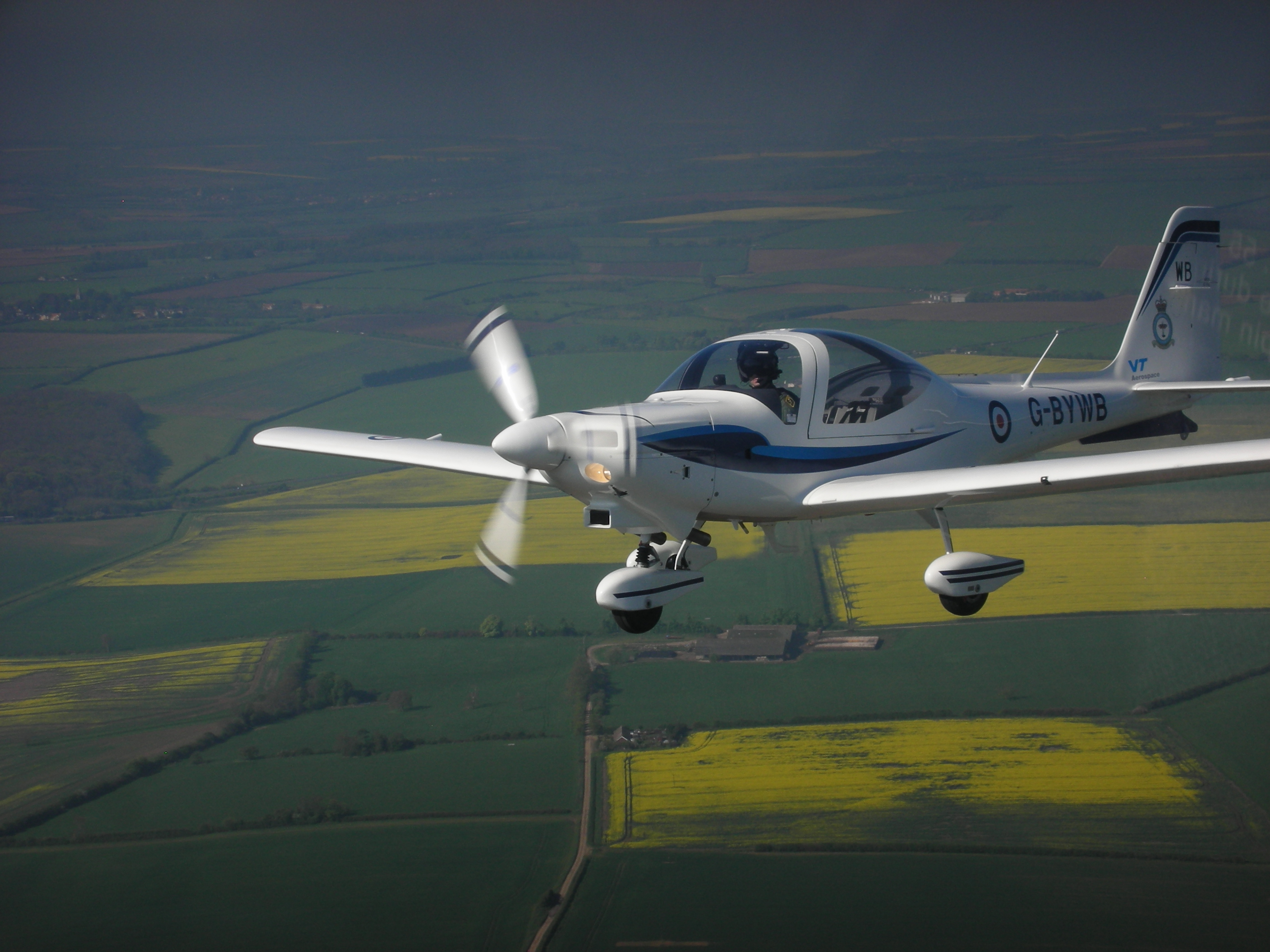 Grob Tutor